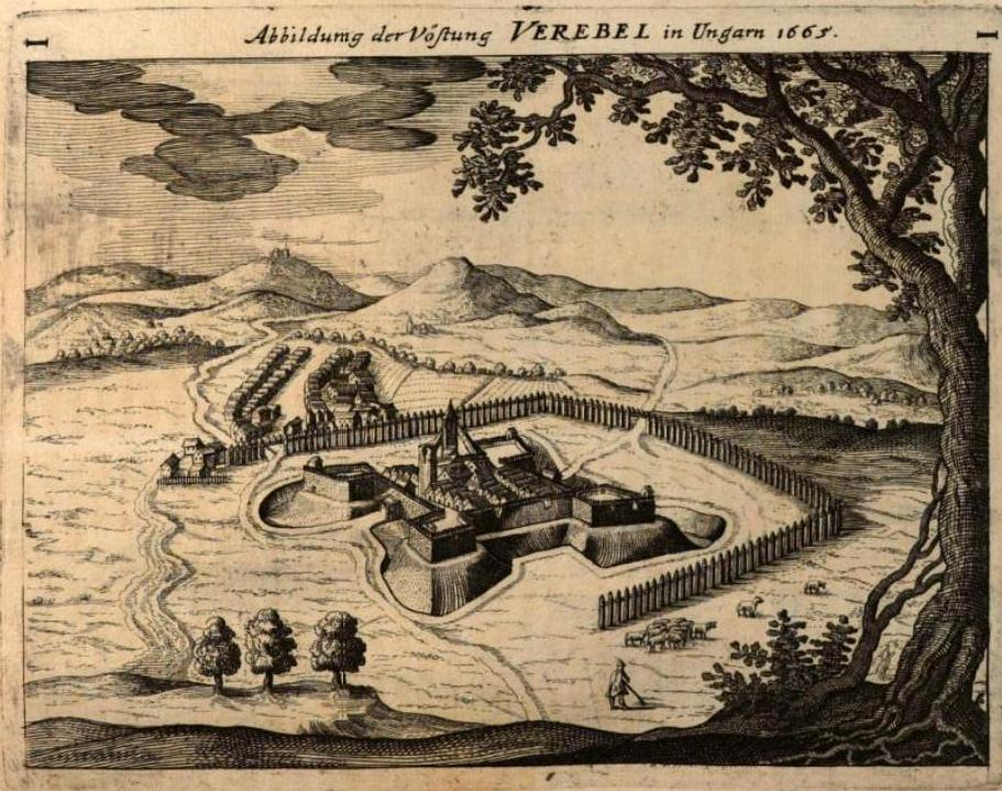 Verebély vára Ortelius krónikájában